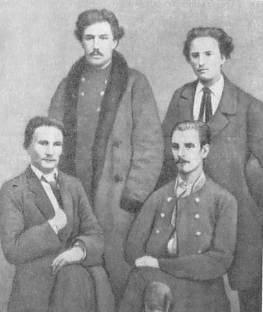 Группа участников виленской революционной организации слева на право: сидят Петр Эмануэль Юндзилл, Эдмунд Вериго, стоят Станислав Буховецкий, Юзеф Ямонт. Фоторепродукция. Восстание в Литве и Белоруссии 1863-1864 гг. Москва, 1965